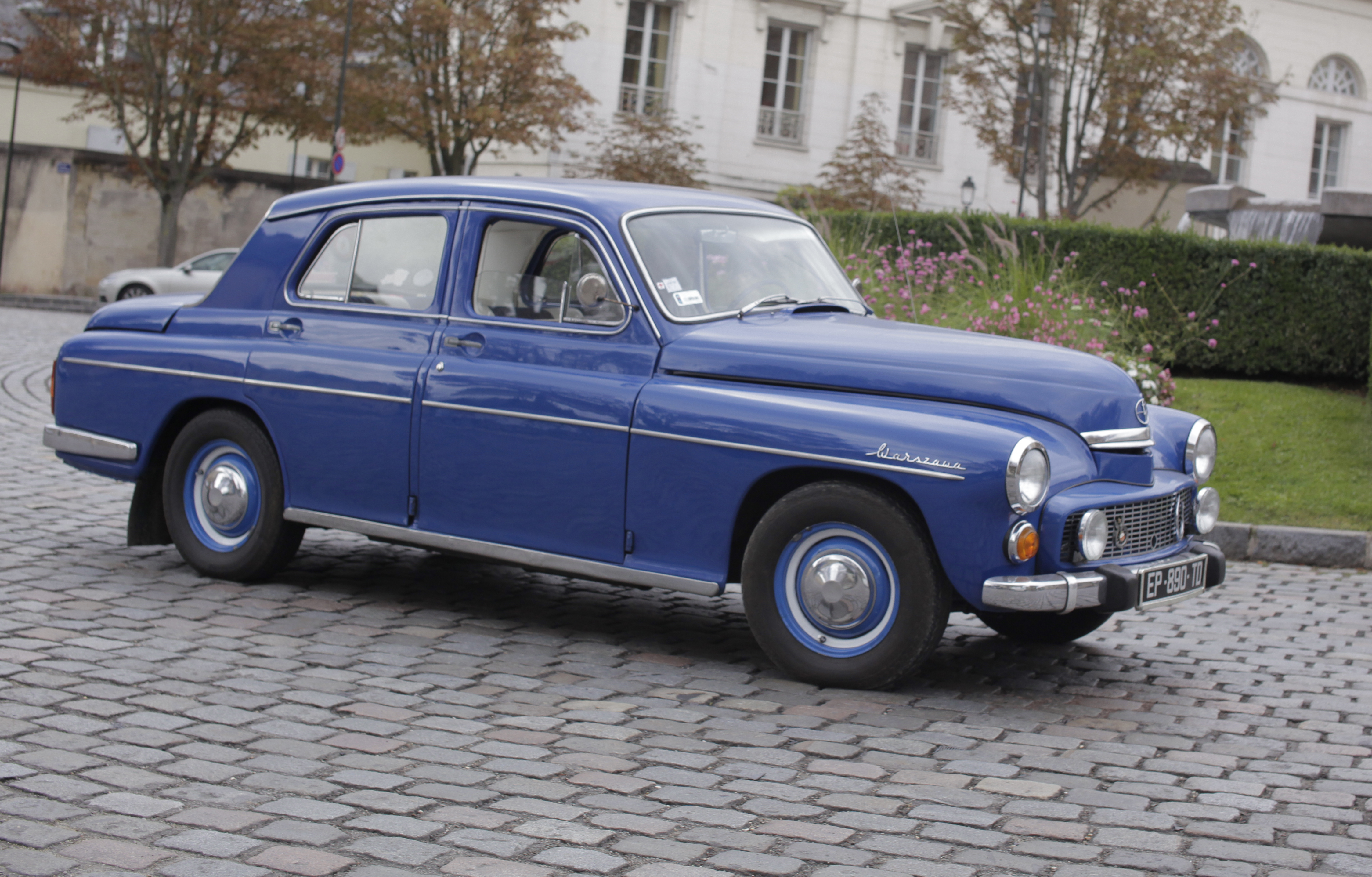 La FSO Warszawa est la première voiture produite par le constructeur automobile polonais FSO. À sa naissance en 1951, elle n’était en réalité qu’une GAZ Pobieda soviétique assemblée sous licence. Sa carrière a duré jusqu’en 1973, mais elle était encore la voiture la plus répandue en Pologne au début des années 80.